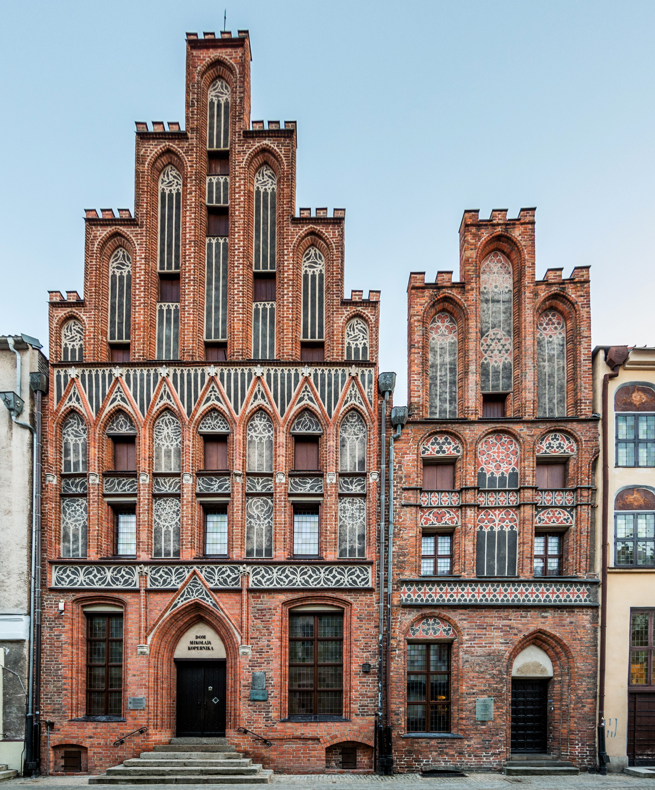 Kamienice przy ul. Kopernika 15 (po lewej) i 17 (po prawej) w Toruniu. Kamienica nr 15 jest uważana za jedno z miejsc, w których mógł urodzić się Mikołaj Kopernik. Jest to jedna z najlepiej zachowanych kamienic gotyckich w Toruniu, zbudowana w XV w. i przebudowywana w XVII, XVIII i XIX w. W latach 70. XX w. zaadaptowana na potrzeby oddziału Muzeum Okręgowego.